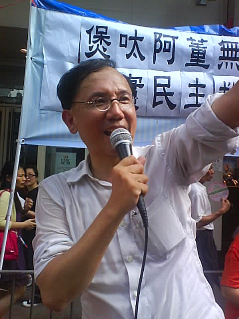 Information |A= 勞永樂 |B= User:Iflwlou |C= 2008/7/1 |D= |E= |F= no